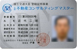 2回目までの更新はシルバーのカード